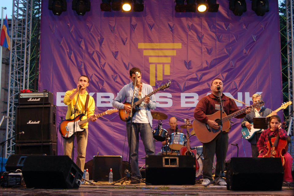 Լավ Էլի